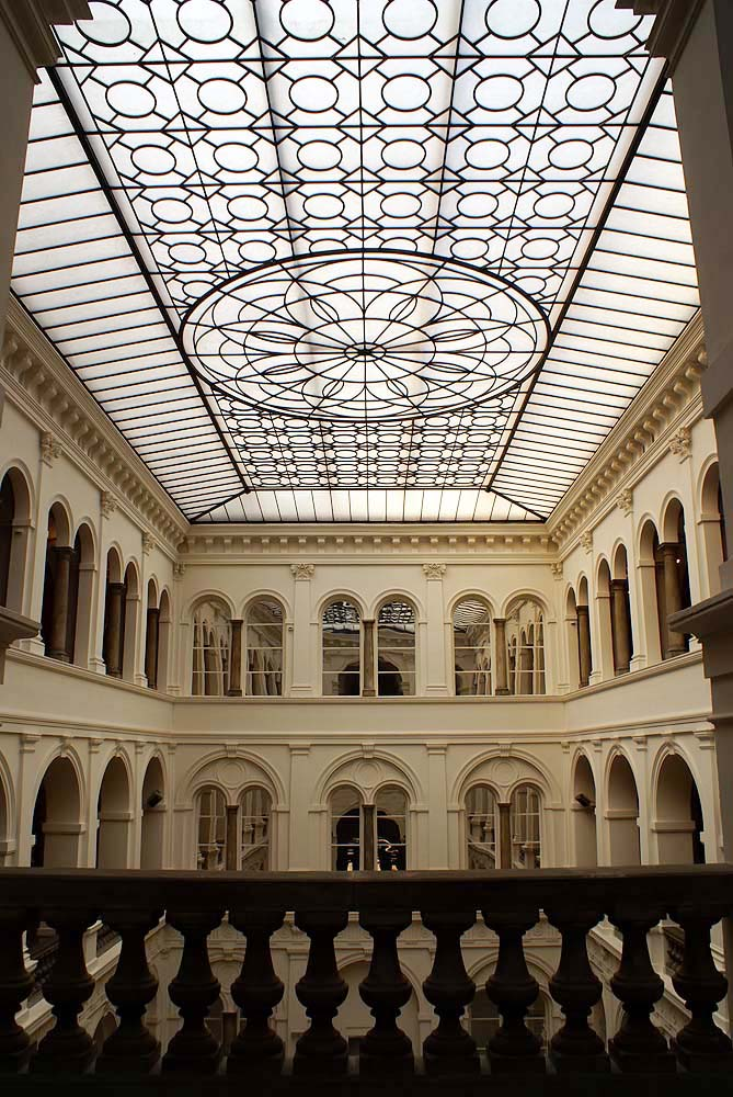 Wrocław, gmach Muzeum Narodowego, 1883-1886